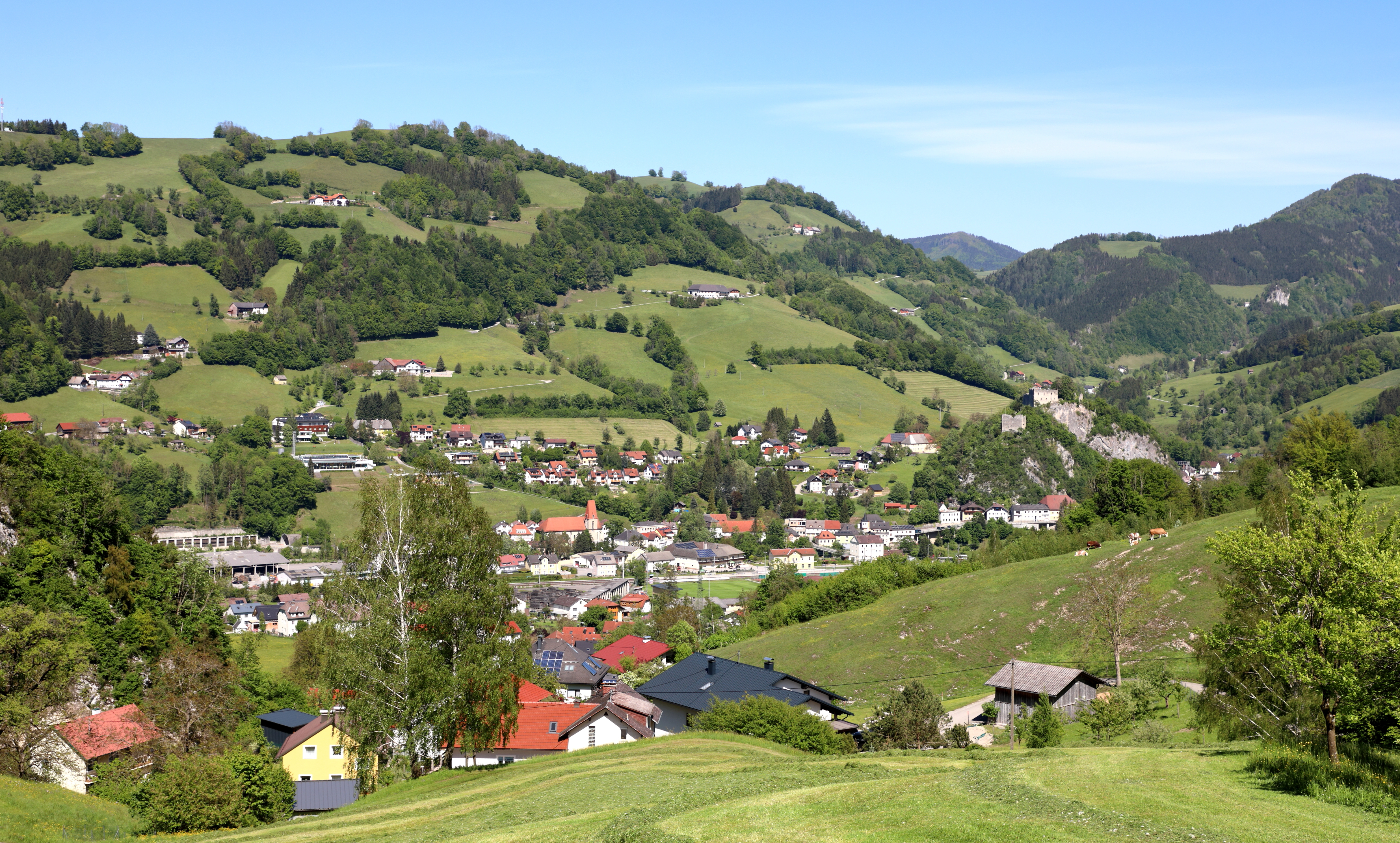 Westsüdwestansicht der oberösterreichischen Gemeinde Losenstein mit der röm.-kath. Pfarrkirche hl. Blasius im Bildzentrum und der Burgruine Losenstein am rechten Bildrand.